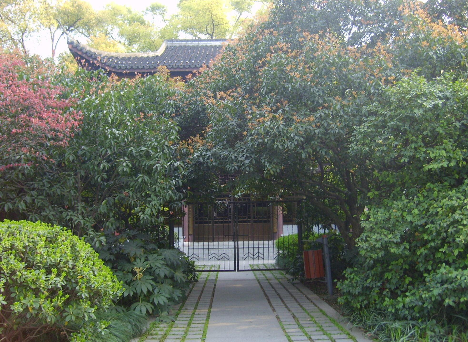 位于西湖边的曲园